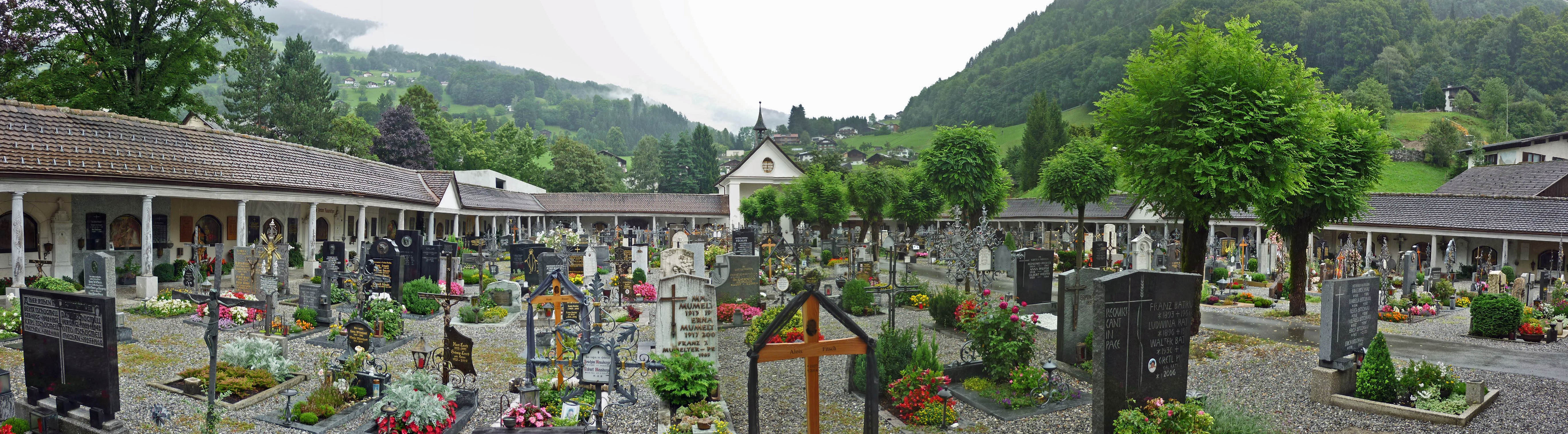 Friedhof in Schruns im Montafon